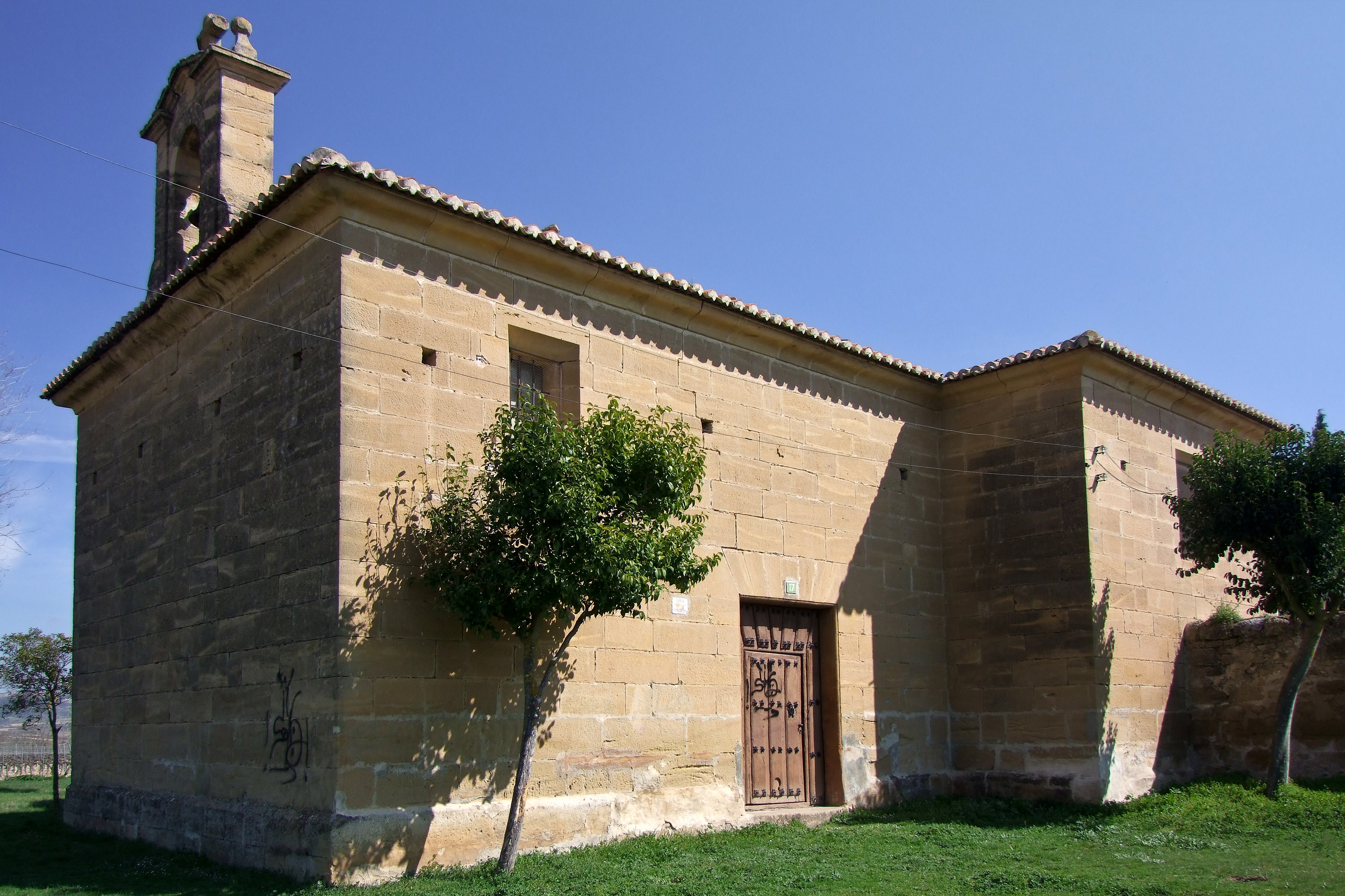 Ermita de la Concepción en la localidad de Anguciana, La Rioja - España